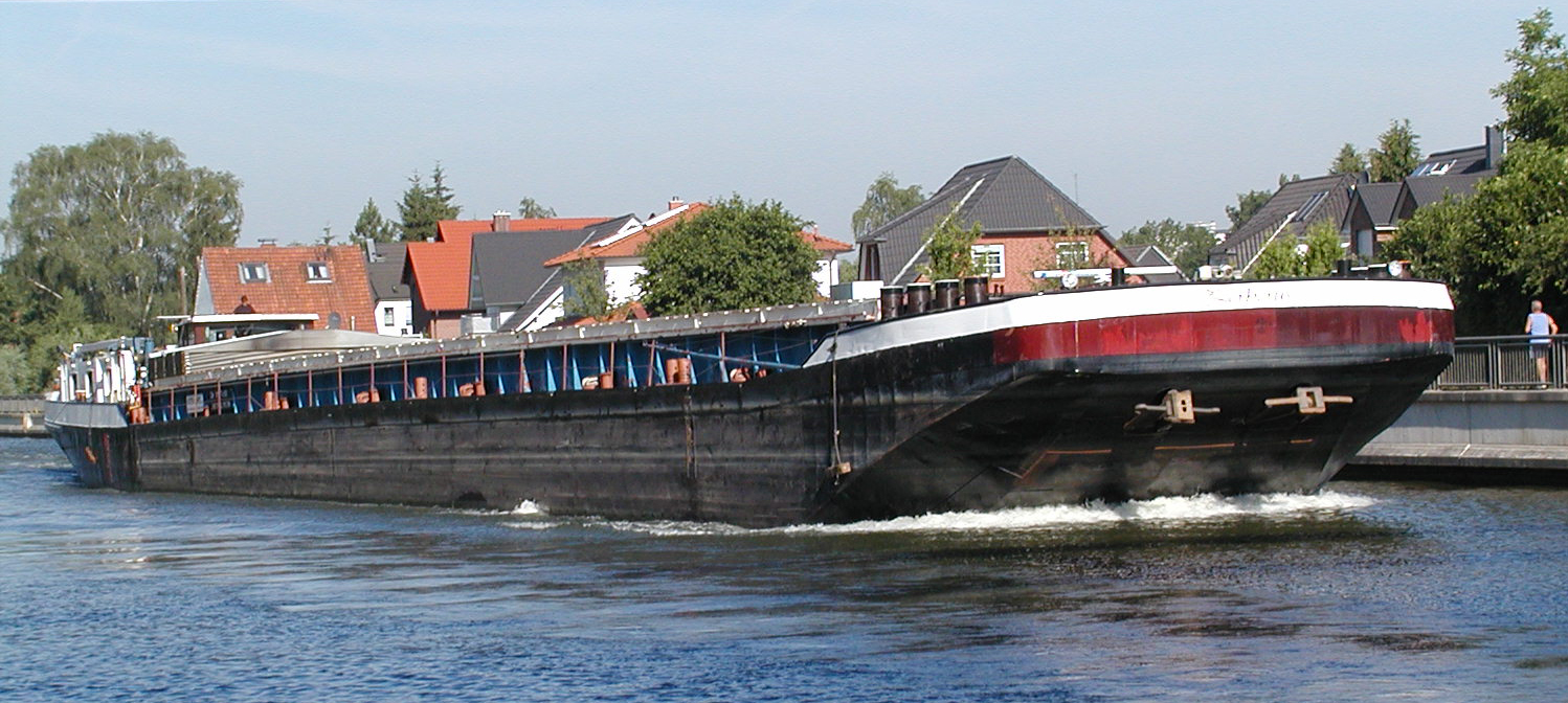 Ein leeres Binnenschiff auf dem Mittellandkanal in Hannover